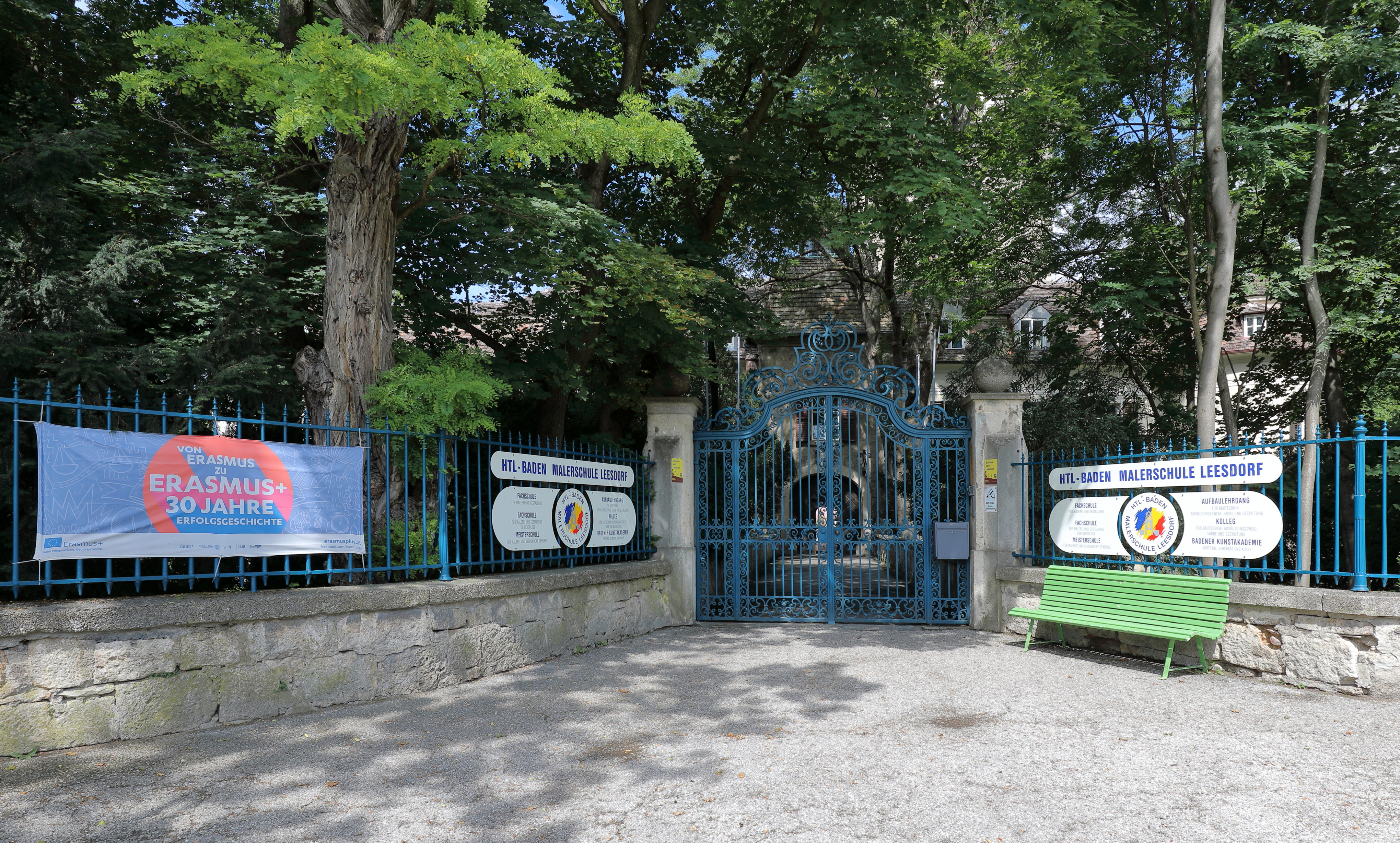 Hauptportal des Schlosses Leesdorf in der niederösterreichischen Stadt Baden. Das Schloss dient als Schulgebäude der Privatschule (mit Öffentlichkeitsrecht) Höhere Technische Lehranstalt Baden, Malerschule Leesdorf.